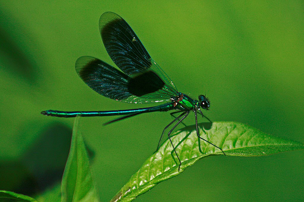 Une dentelle aux reflets envoutants